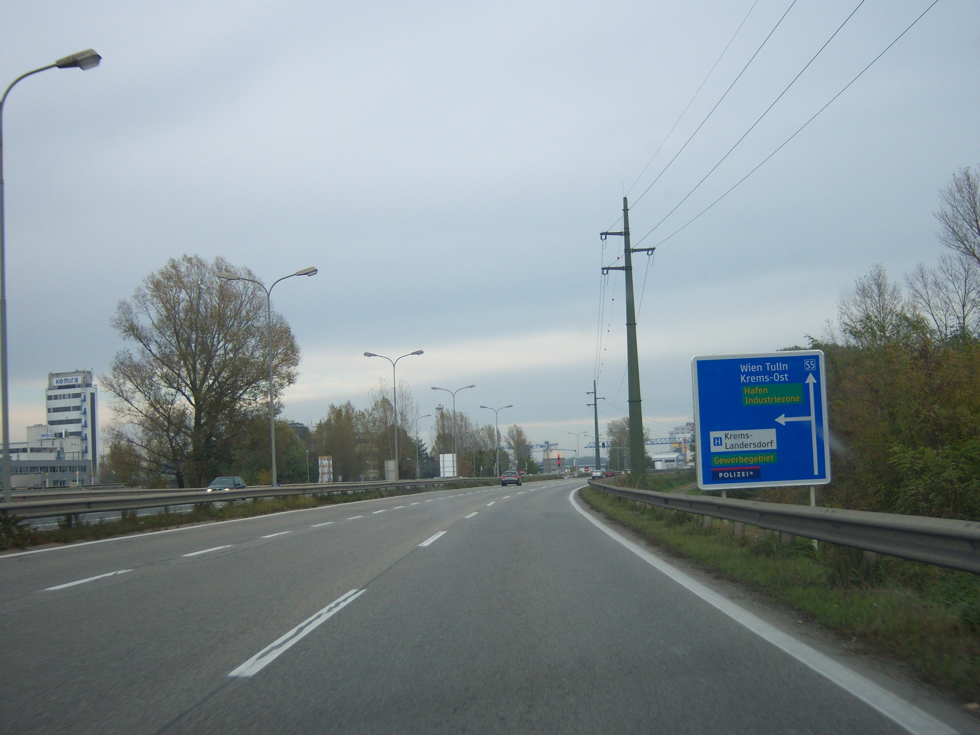 Stockerauer Schnellstraße S5 Richtung Wien im Bereich der Abzweigung Krems-Landersdorf